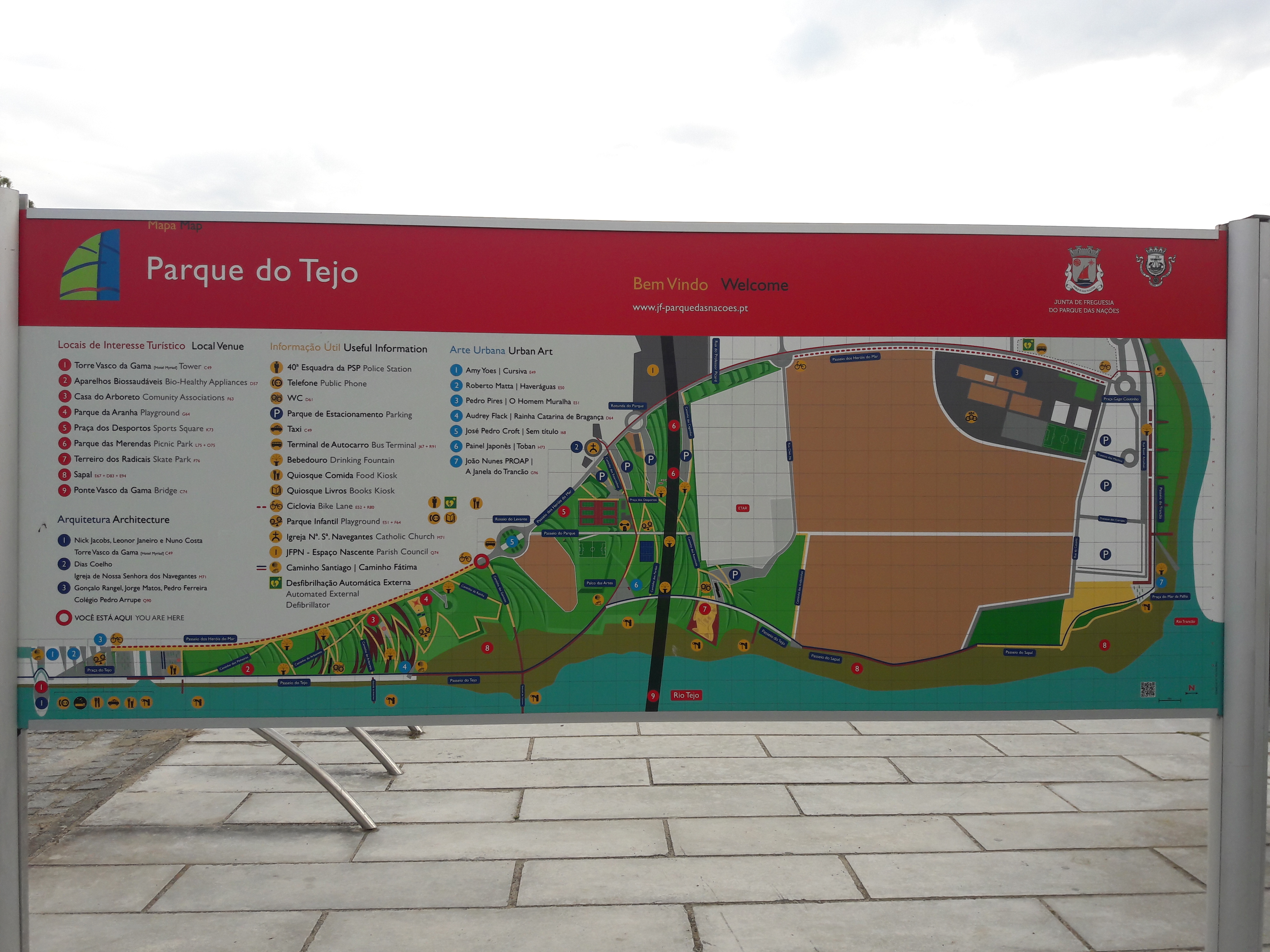 Mapa informativo do Parque Tejo, em Lisboa